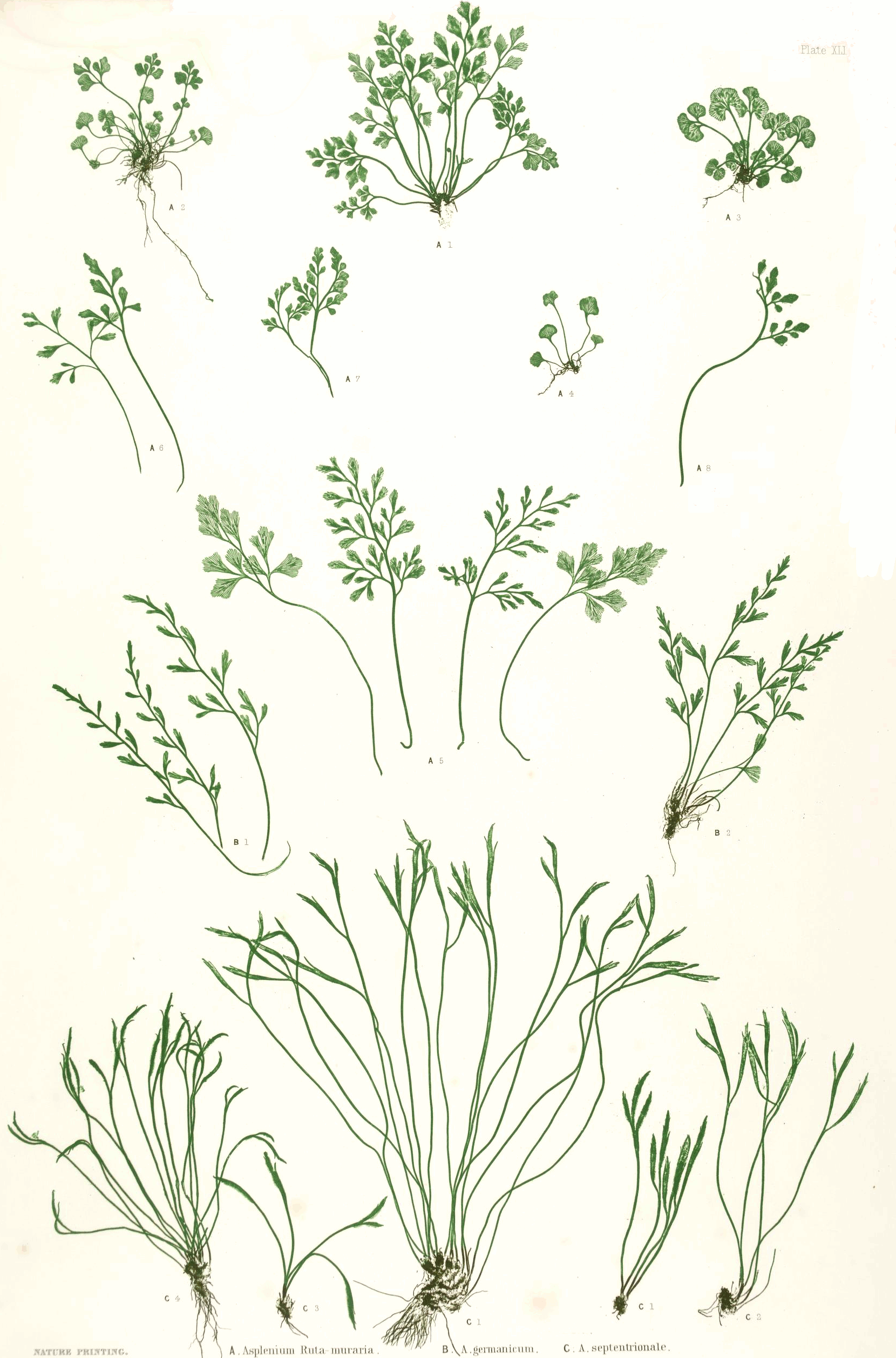 Plate from book. A (top). Asplenium ruta-muraria, B (middle). Asplenium × germanicum (hybrid A. ruta-muraria × A. septentrionale), C (bottom). Asplenium septentrionale